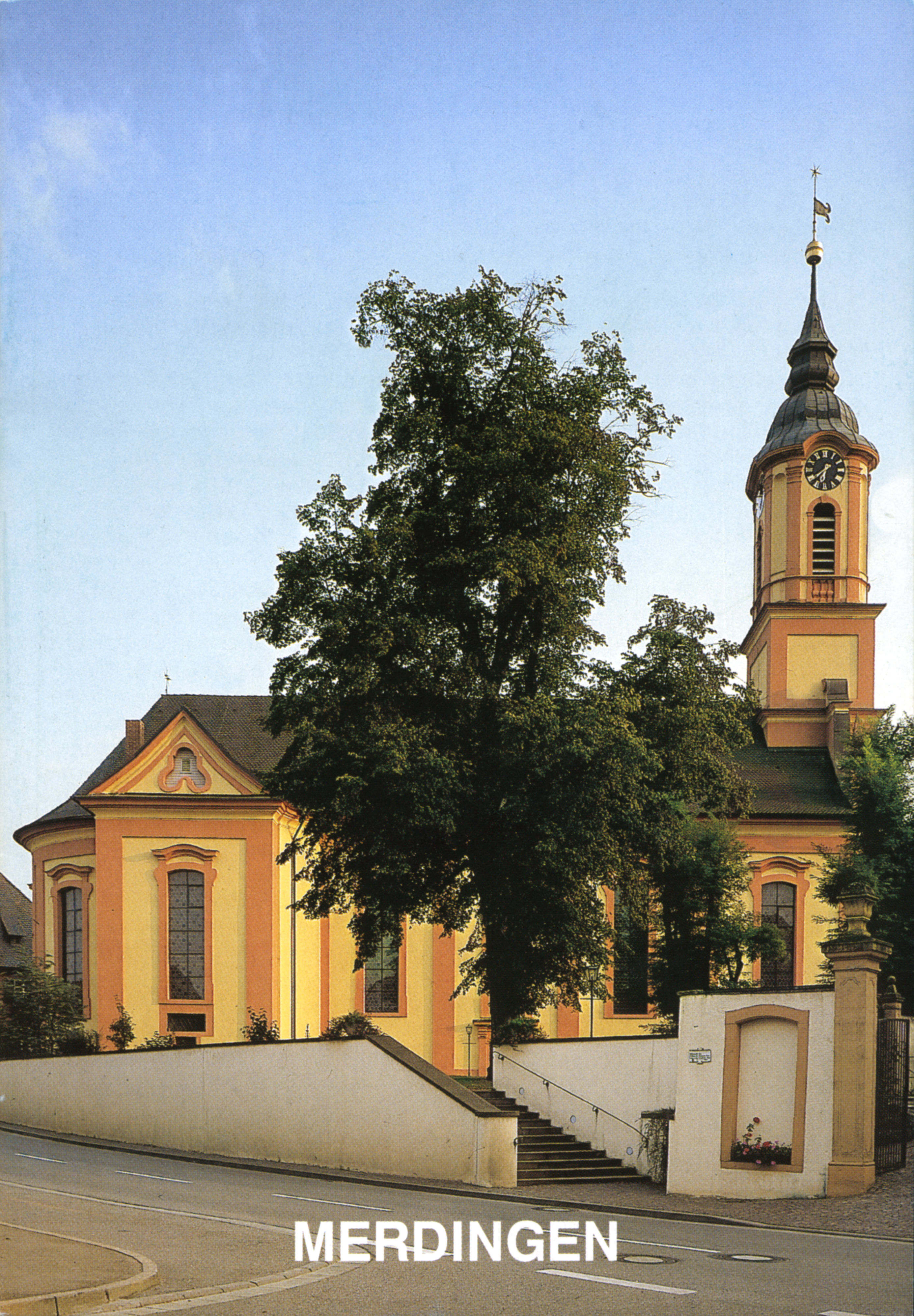 Umschlagbild des Kunstführers MerdingenUnknown cover of art guide "merdingen"